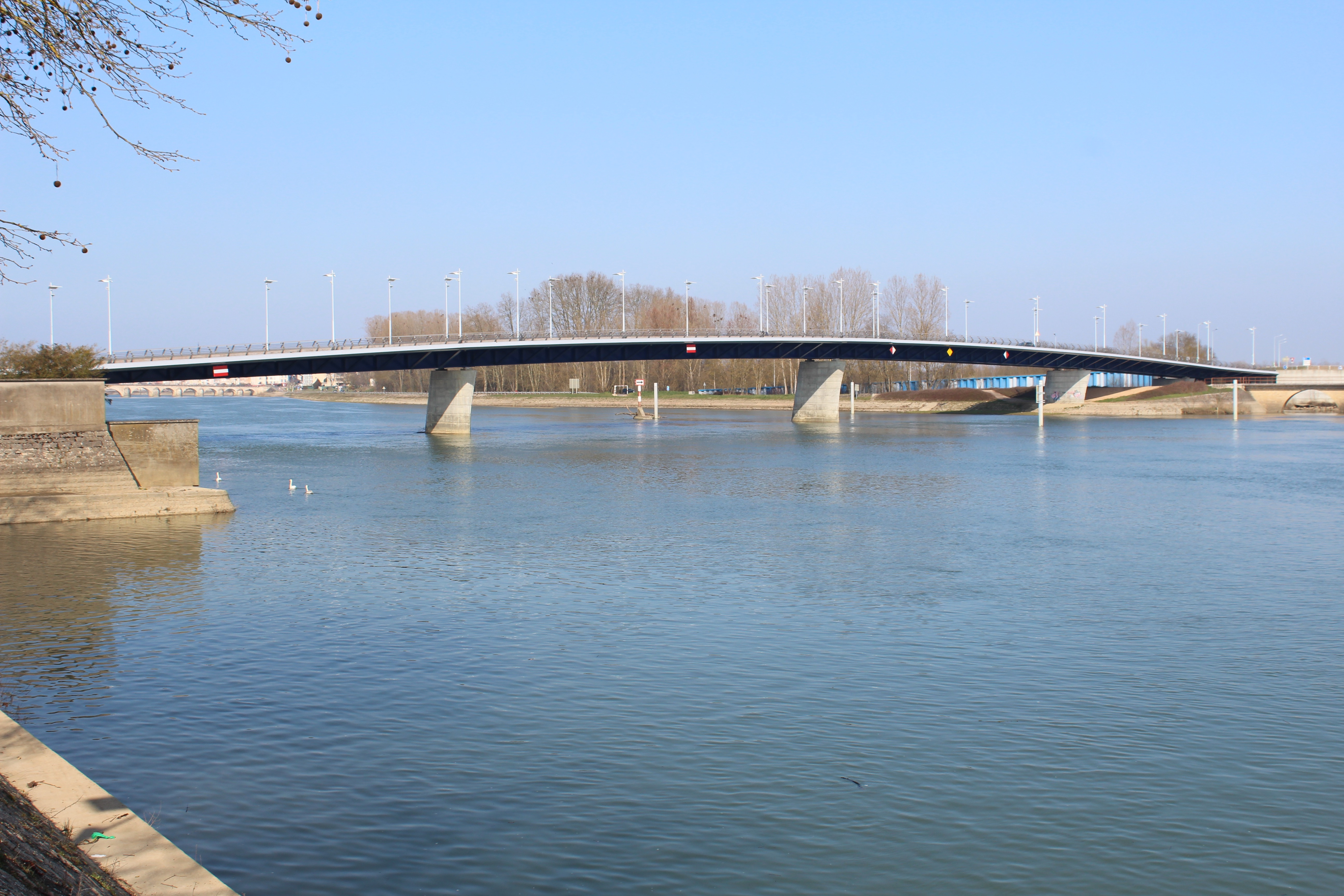 Pont François Mitterrand enjambant la Saône entre Mâcon et Grièges dans l'Ain.